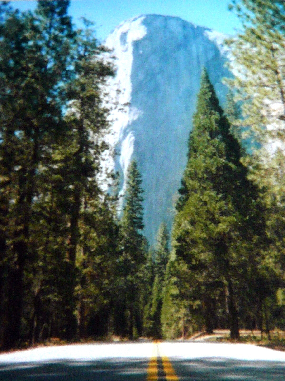 Le plus gros monolithe granitique du monde dans le parc Yosemite (Californie)